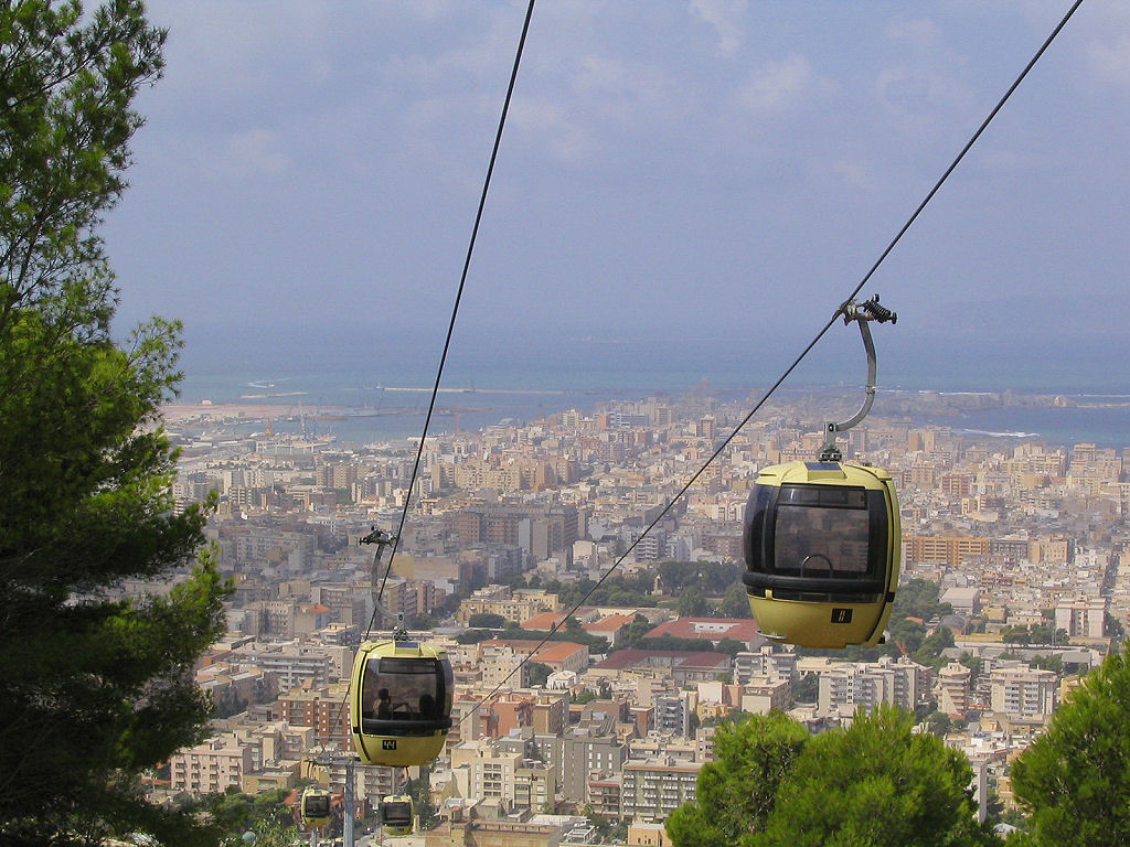 トラーパニ